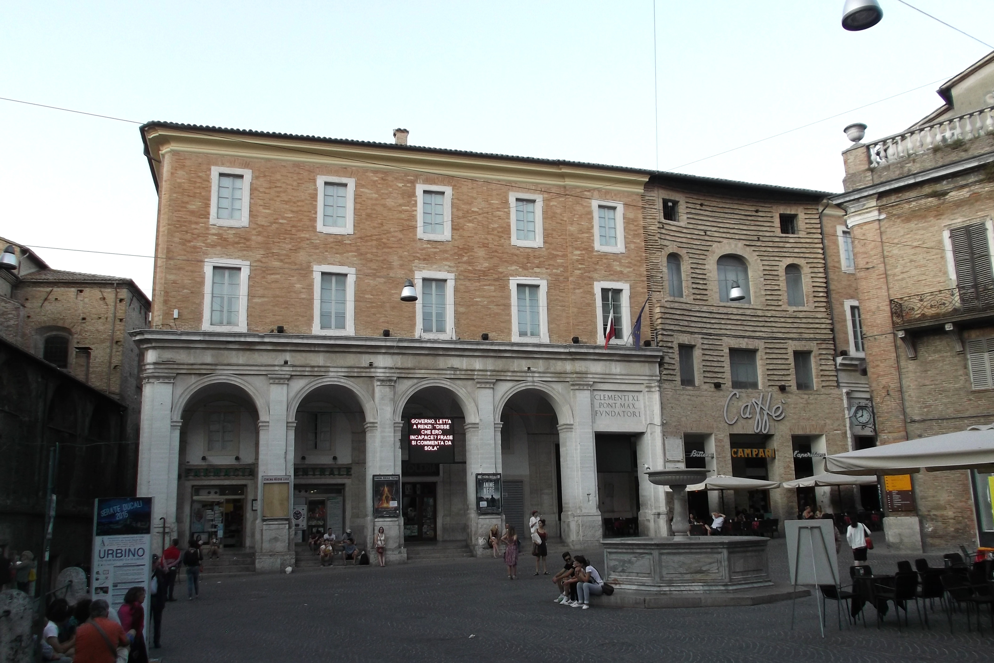 Collegio Raffaello in Urbino, Marche, Italy